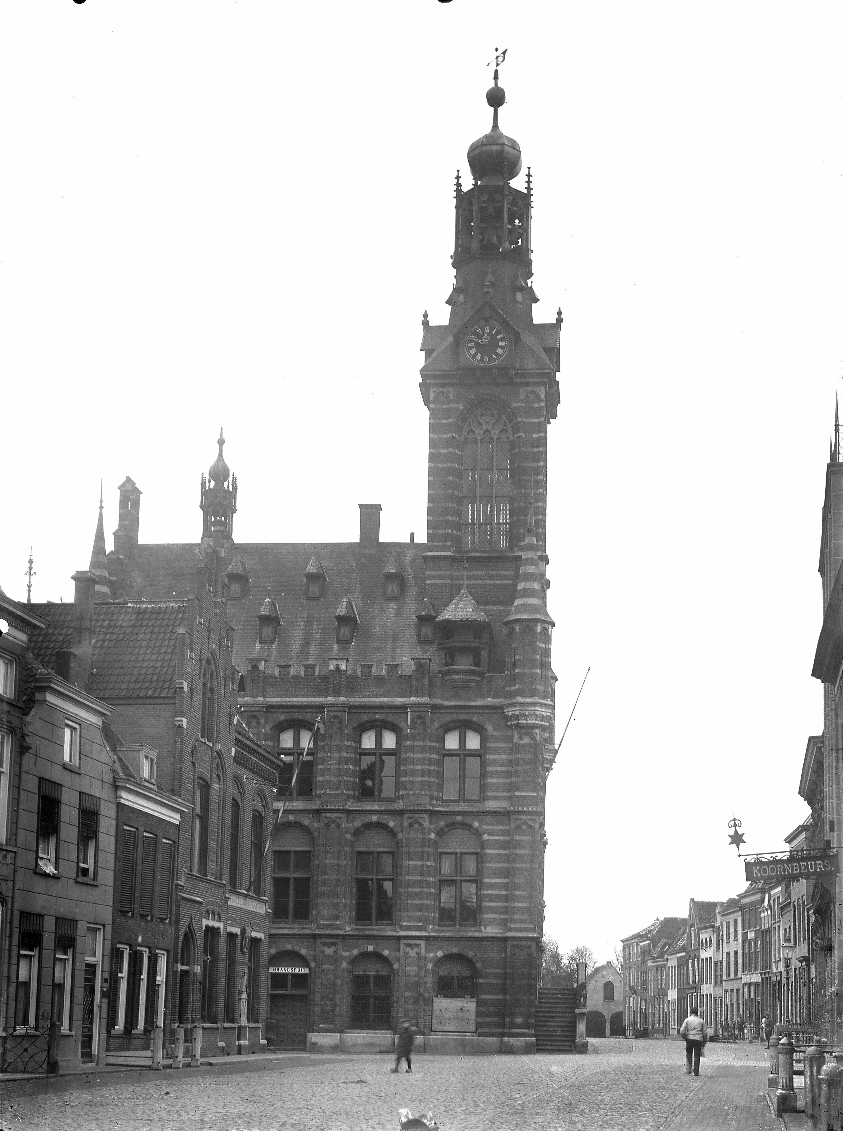 Stadhuis: Zicht op het stadhuis, verwoest in 1944